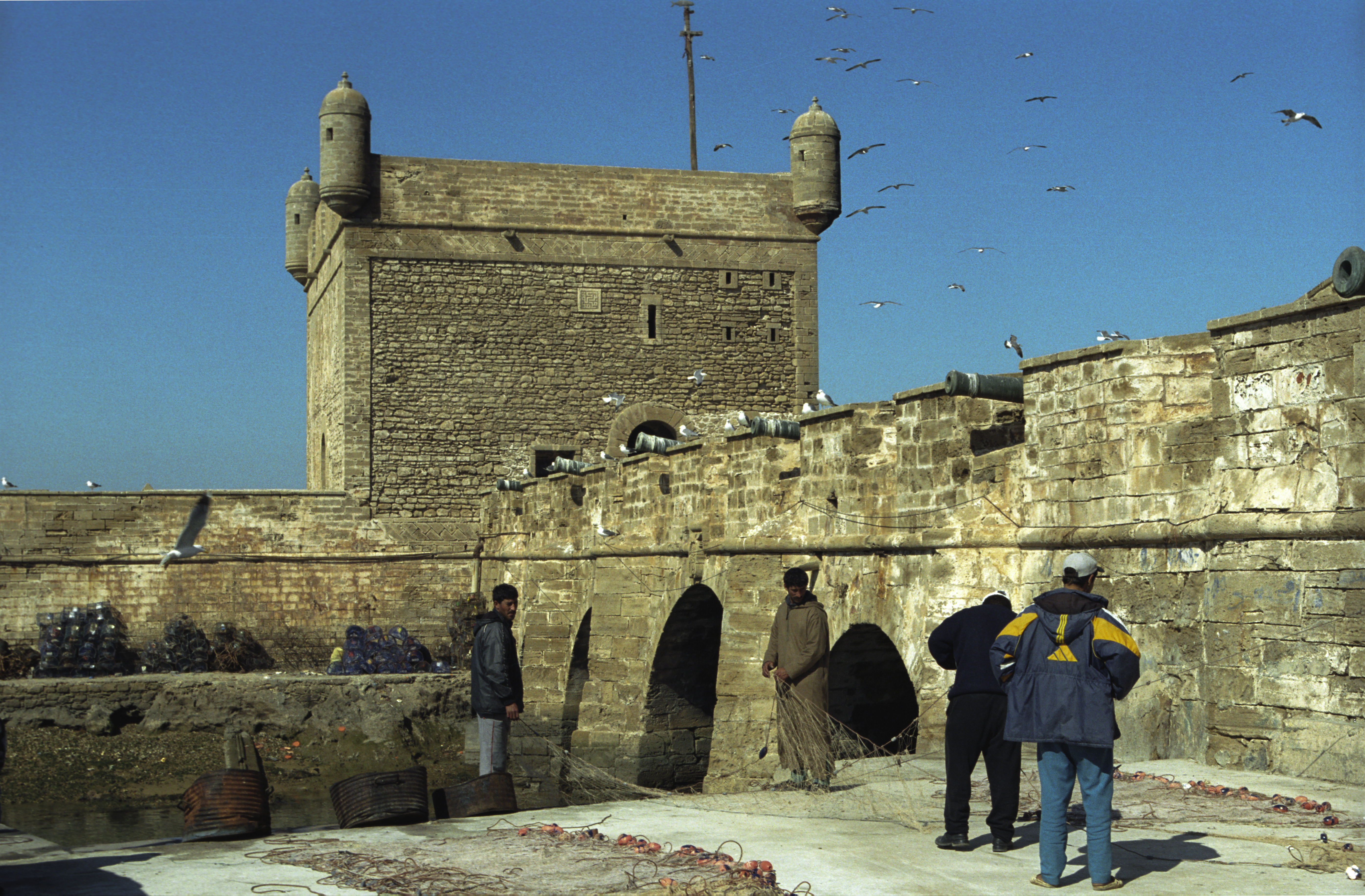 Essaouira,Skala du Port